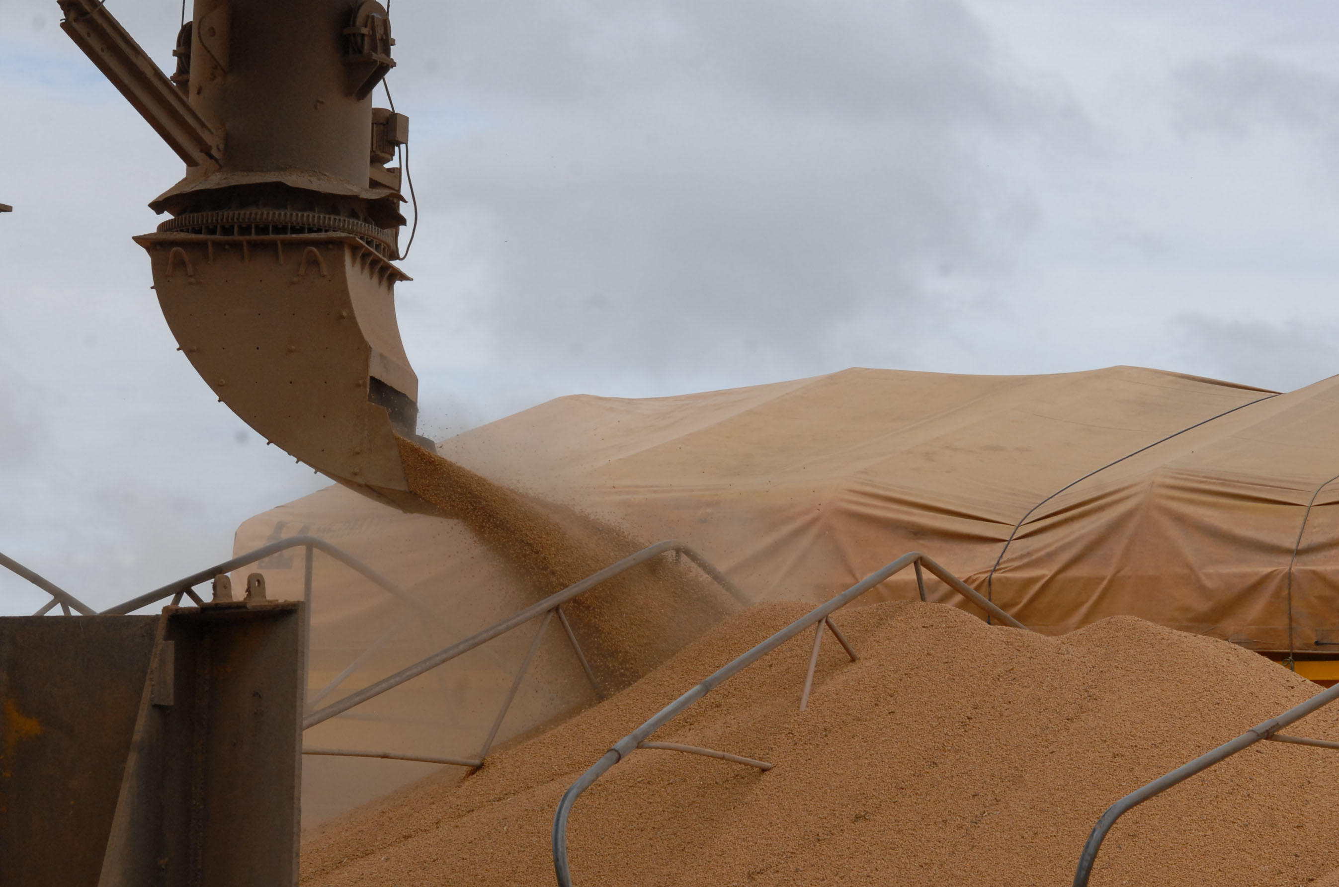 Soja